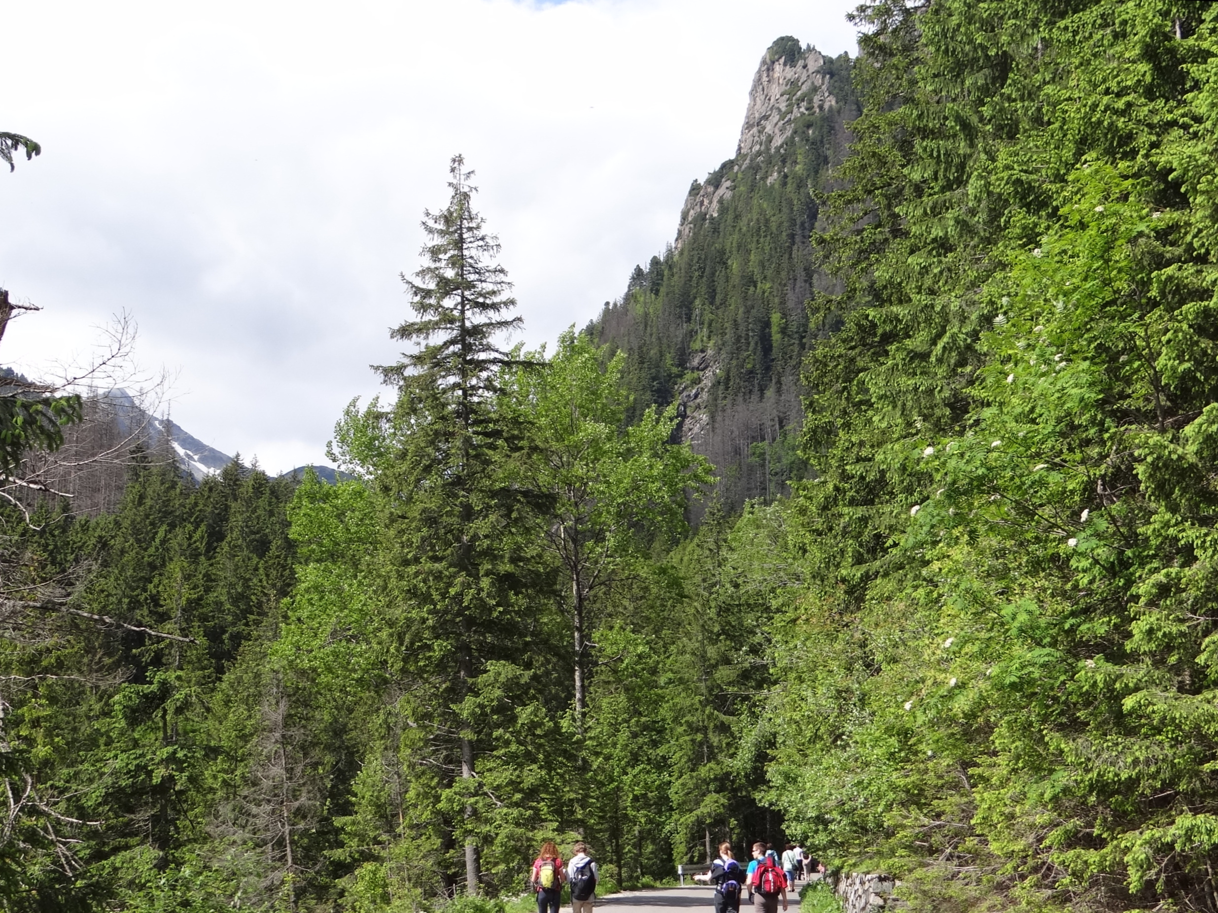 Widok z Drogi Oswalda Balzera na Roztocką Turniczkę